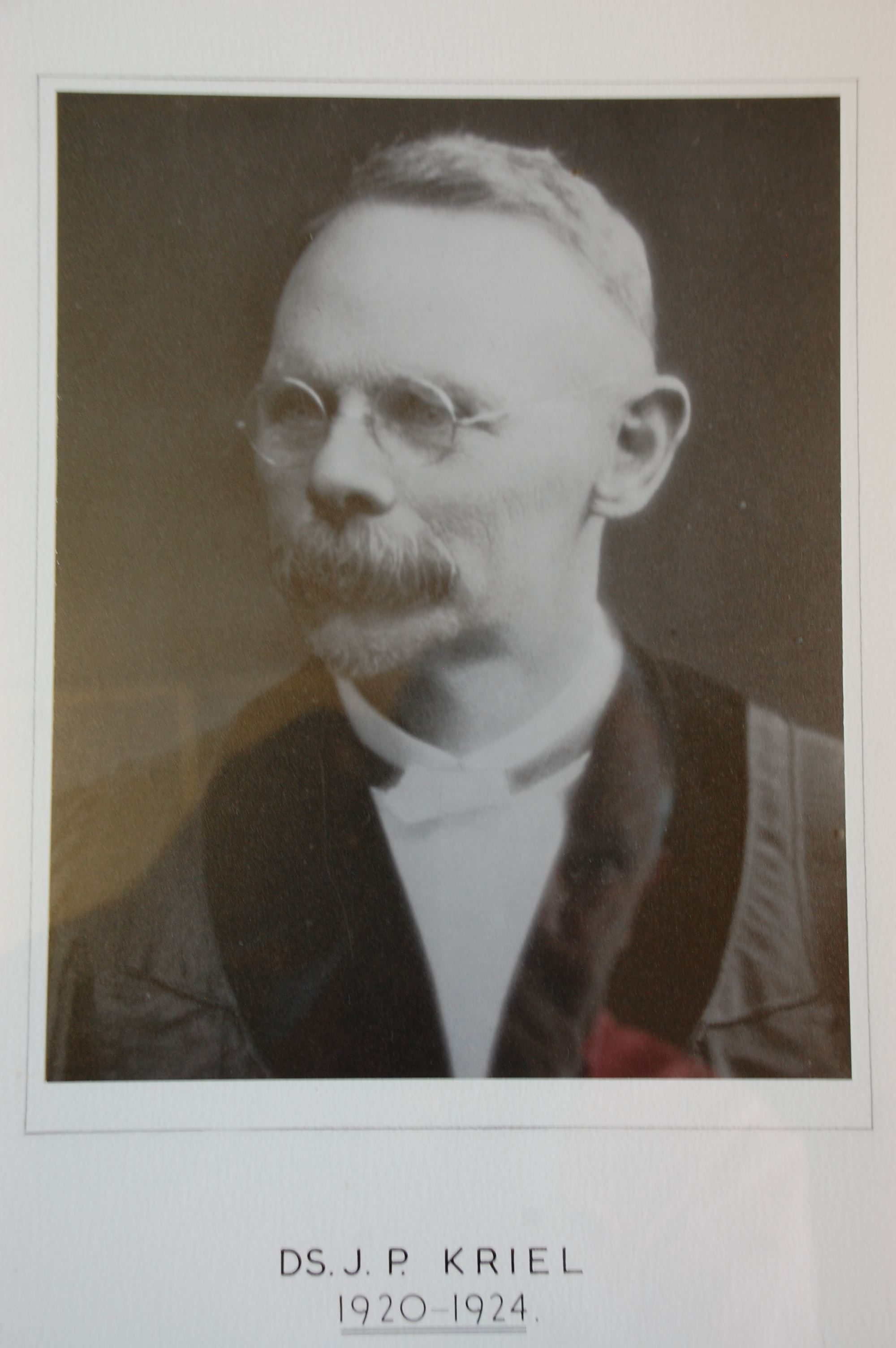 Na Kuilsrivier